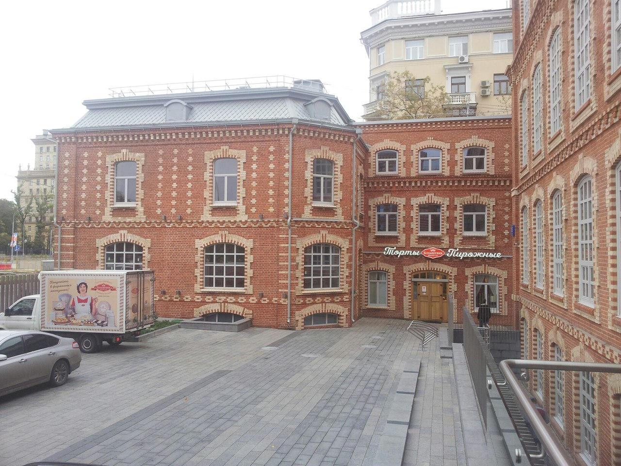 Кондитерский магазин: Ленинградский просп., дом 15, строение 3, Беговой, Северный округ, Москва